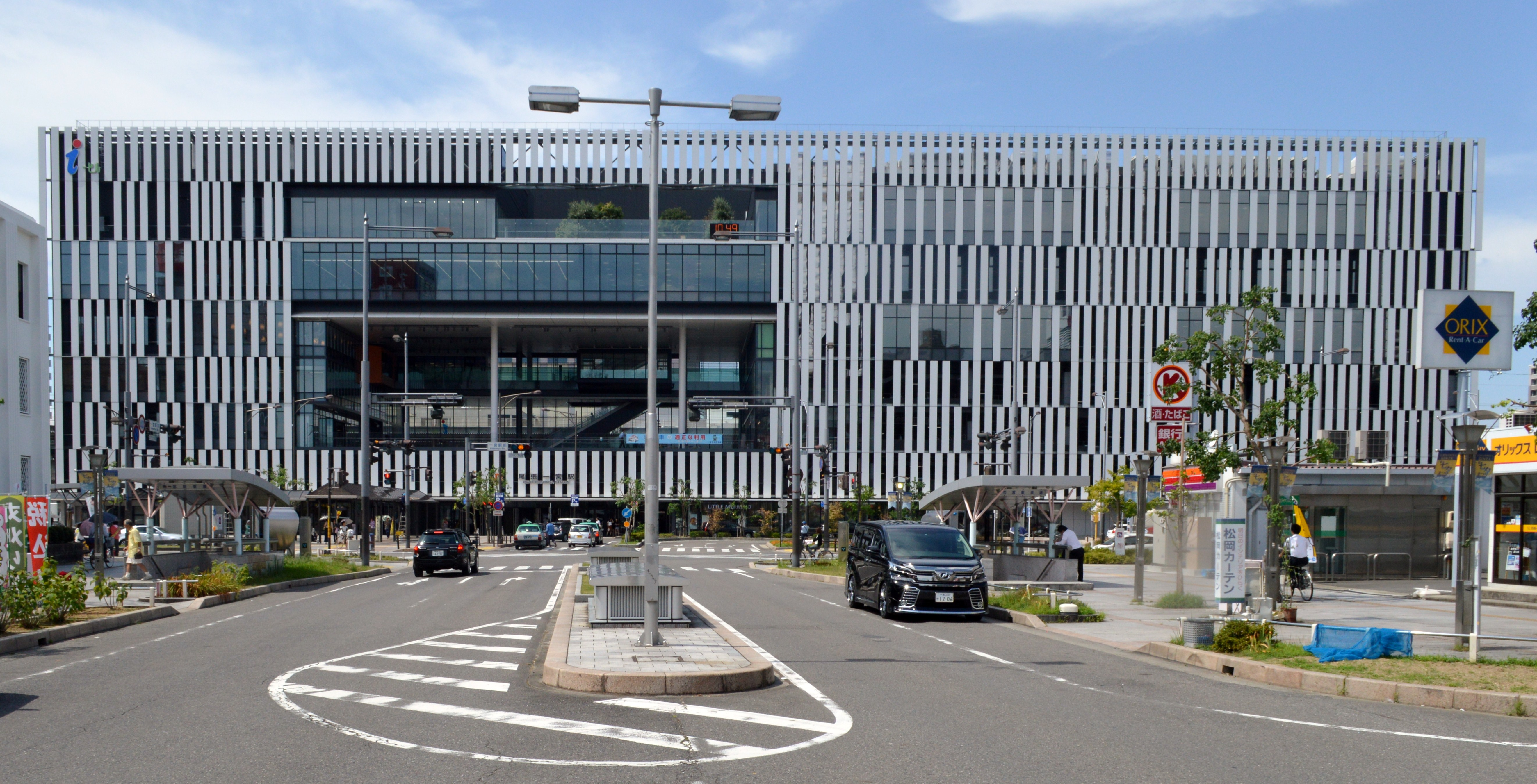 尾張一宮駅前ビル（i-ビル） 一宮市立中央図書館などを内包